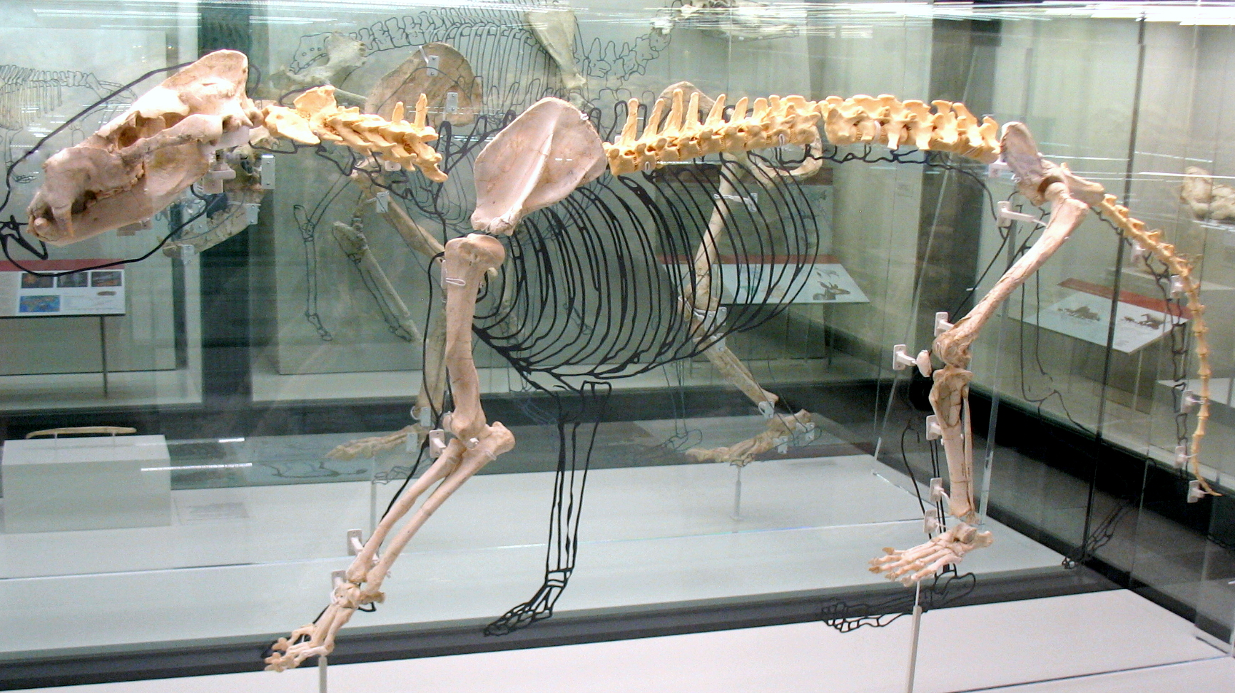 Montaje del esqueleto de Magericyon anceps. Yacimiento de Batallones 1, Torrejón de Velasco, Madrid, España. Exposición temporal "La colina de los tigres dientes de sable. Los yacimientos miocenos del cerro de los Batallones (Torrejón de Velasco, Comunidad de Madrid)" en el Museo Arqueológico Regional (MAR), Alcalá de Henares (Madrid)